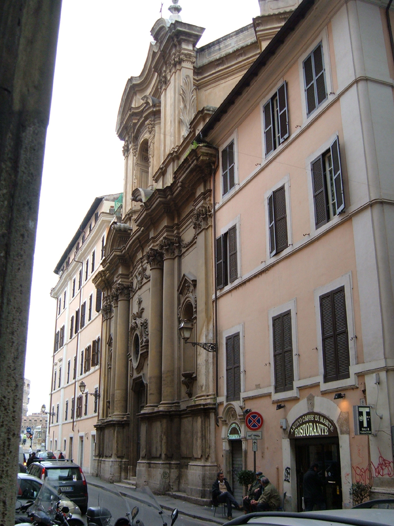 Chiesa dei SS. Celso e Giuliano, a Roma, nel rione Ponte